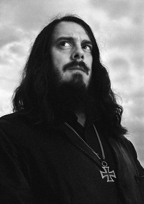 Jonathan Meese